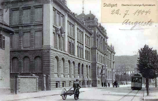 Ansichtskarte des Eberhard-Ludwigs-Gymnasium Stuttgart, verschickt 1904. Im Vordergrund eine Straßenbahn auf der Holzgartenstraße.